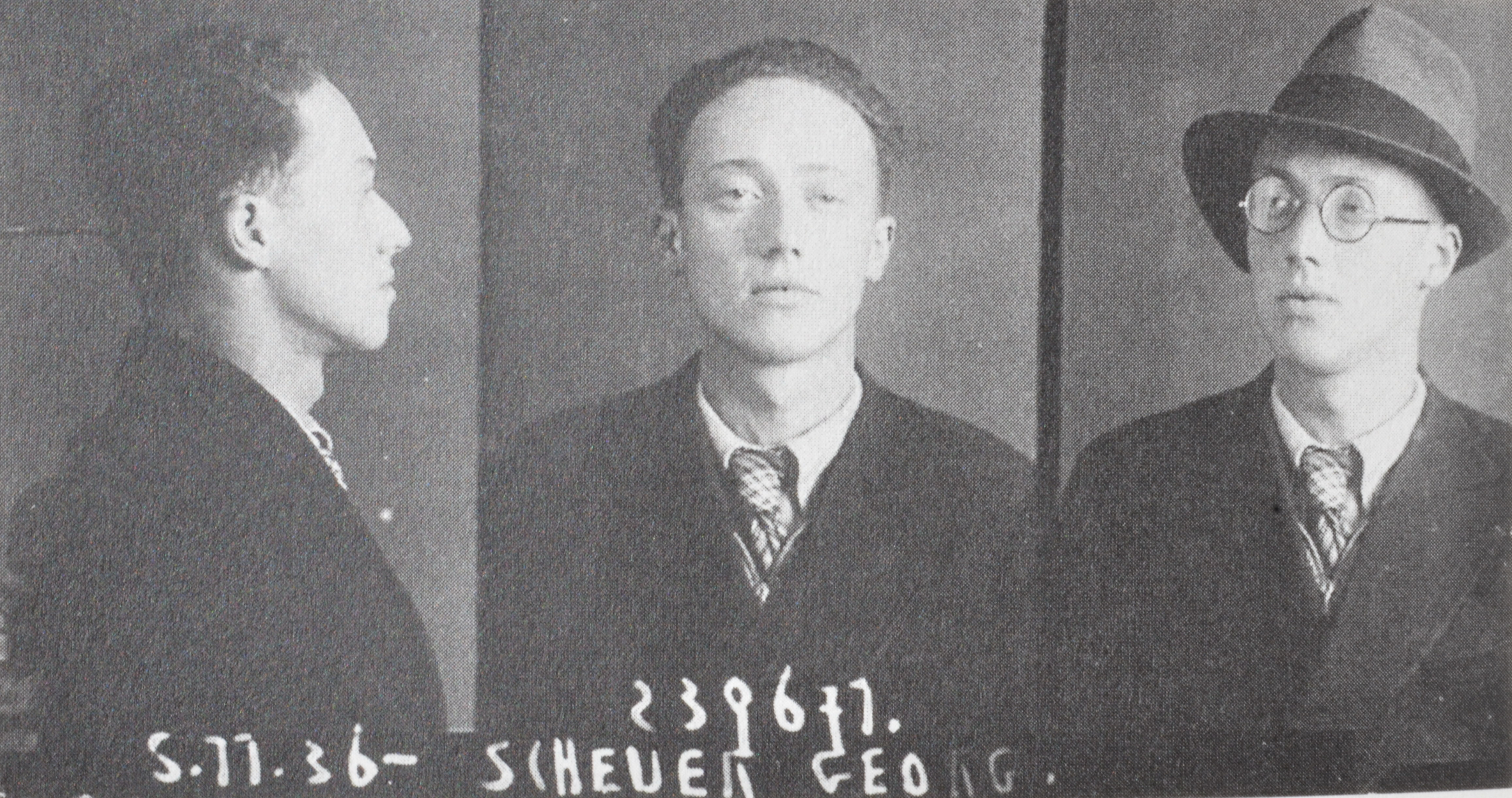 Georg Scheuer, Foto der Österreichischen Staatspolizei, 5.11.1936, in Privatbesitz von Dnalor_01. Auch in: Dokumentationsarchiv des österreichischen Widerstandes, Altes Rathaus, Wipplingerstr.6-8 A-1010 Wien. Das Bild wurde ebenso verwendet und veröffentlicht im Buch: Bernhard Kuschey: Ernst und Hilde Federn. Die Ausnahme des Überlebens. Ernst und Hilde Federn. Eine biographische Studie und eine Analyse der Binnenstrukturen des Konzentrationslagers. Psychosozial-Verlag, Gießen 2003, ISBN 3-89806-173-6, auf der Seite 240. Die Österreichische Staatspolizei (StaPo): Der österreichische Staatspolizeiliche Dienst (StaPo), war als Vorläufer des Bundesamts für Verfassungsschutz und Terrorismusbekämpfung bis 2002 der Inlandsgeheimdienst des Bundesinnenministeriums. In der breiten Öffentlichkeit ist der Name „Stapo“ noch immer verbreitet.